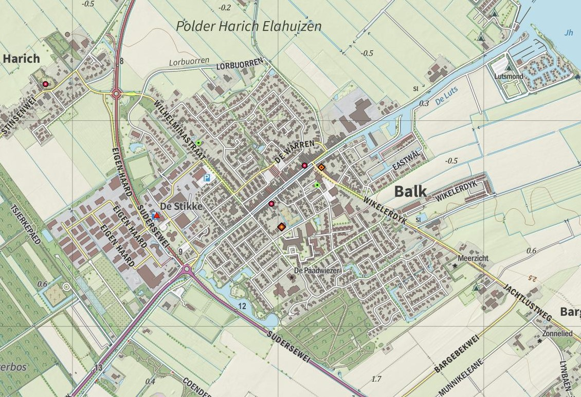 Kaart van Balk in Friesland